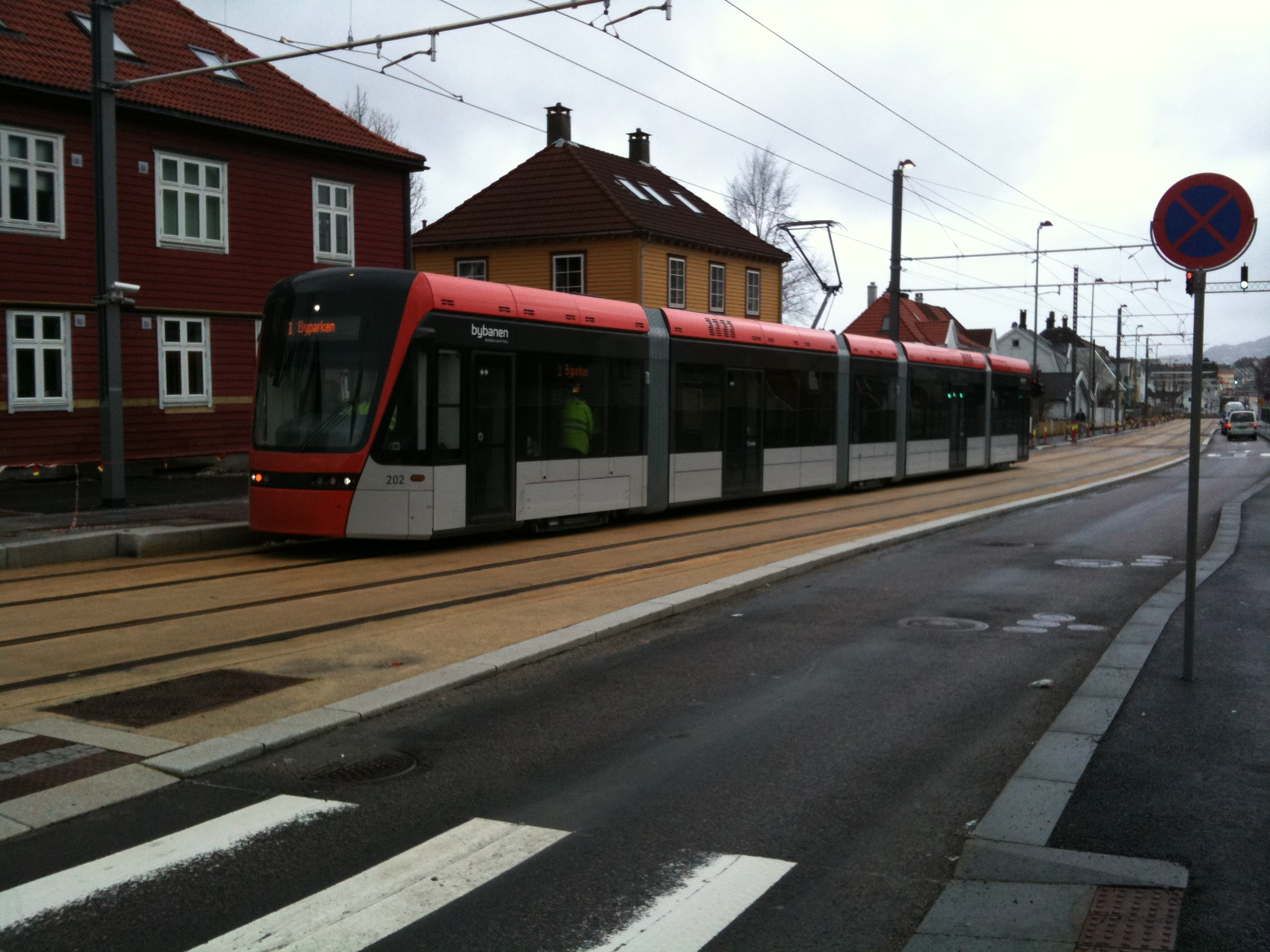 Bybanen i Bergen under testkjøring i mars 2010